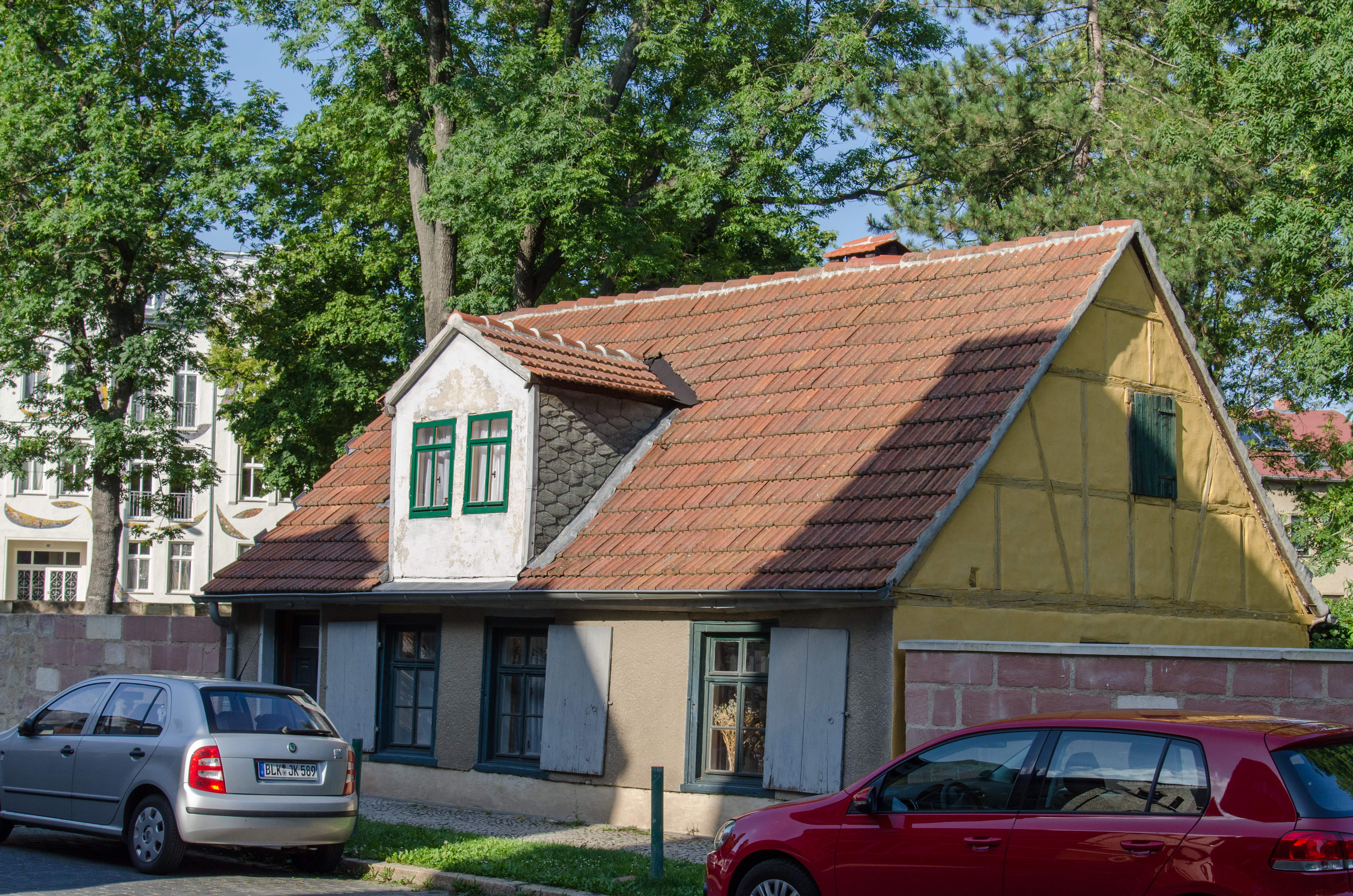 Naumburg, Windmühlenstraße 23